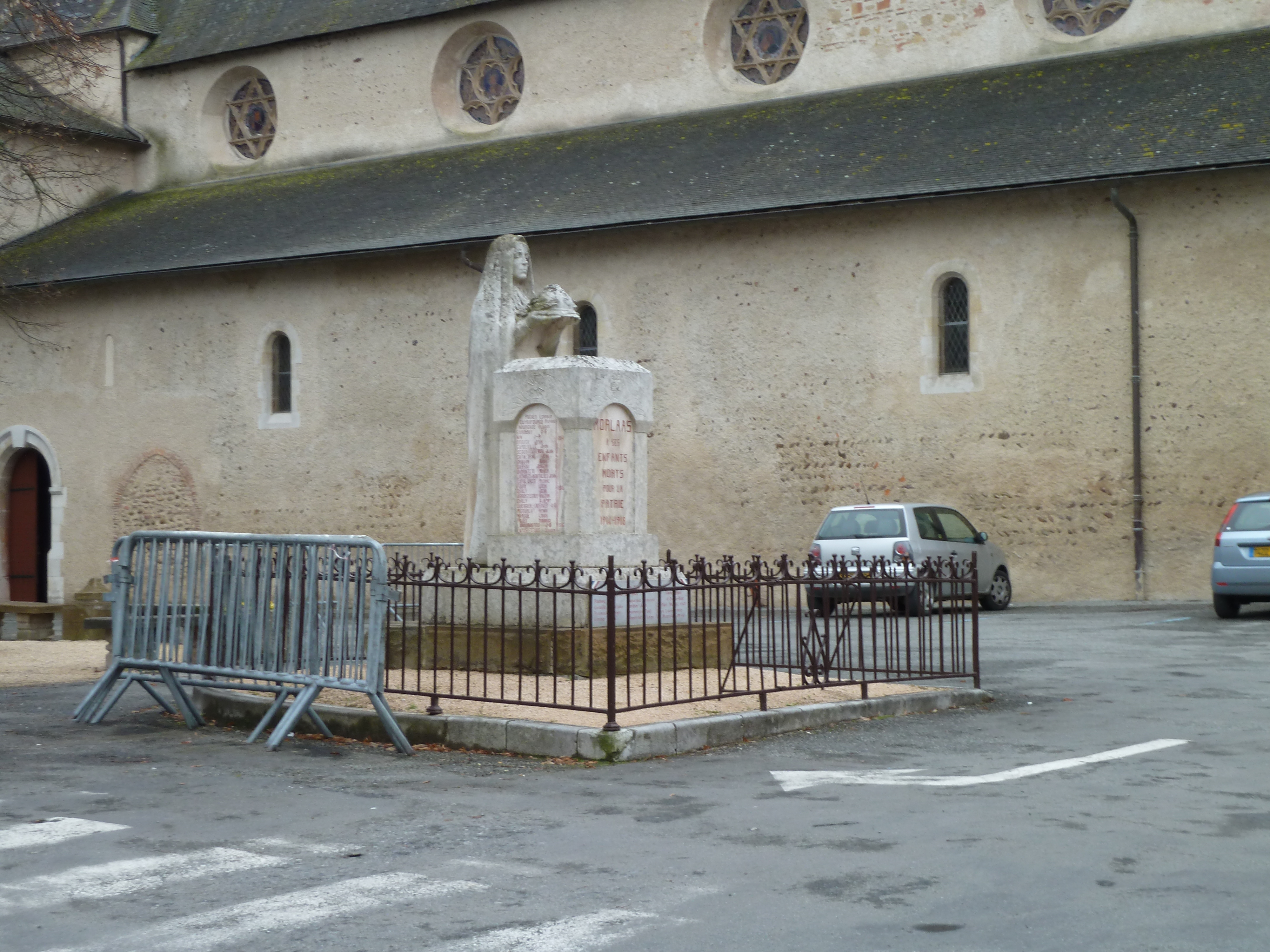 Monument aux morts de Morlaàs, œuvre d'Ernest Gabard